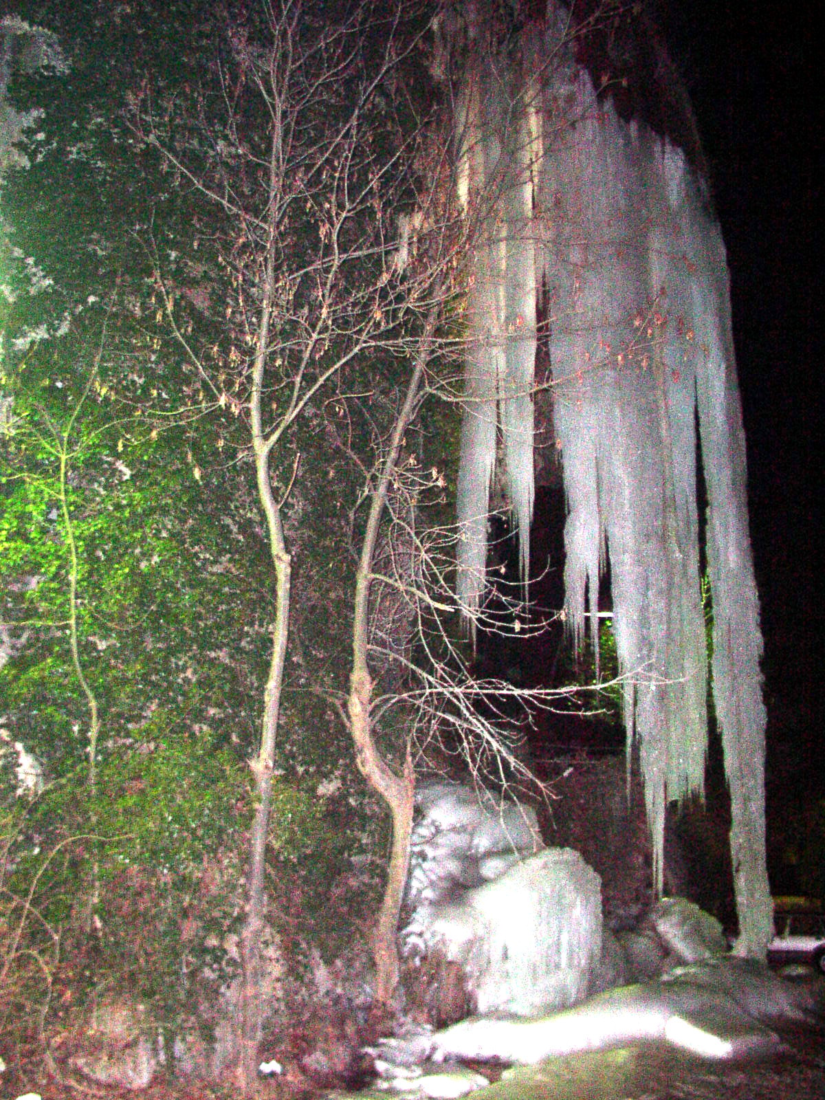 Cascate di Valganna, Italy